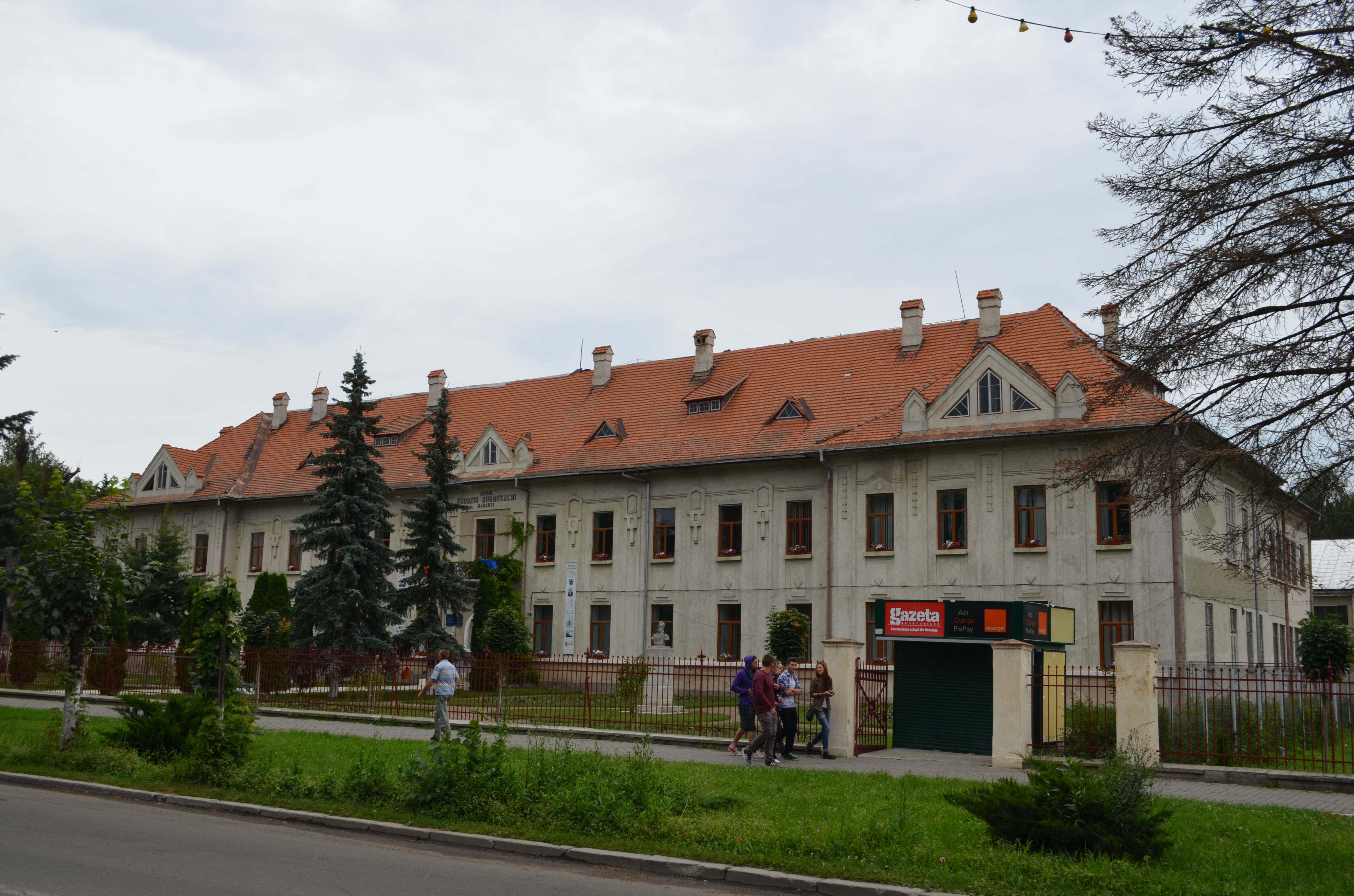 Colegiul Național „Eudoxiu Hurmuzachi”, Calea Bucovinei, nr. 5, Rădăuți